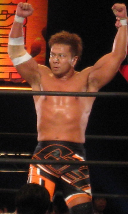 2011年8月7日 大阪府立体育会館 新日本プロレス主催「G1 CLIMAX XXI」 小島聡